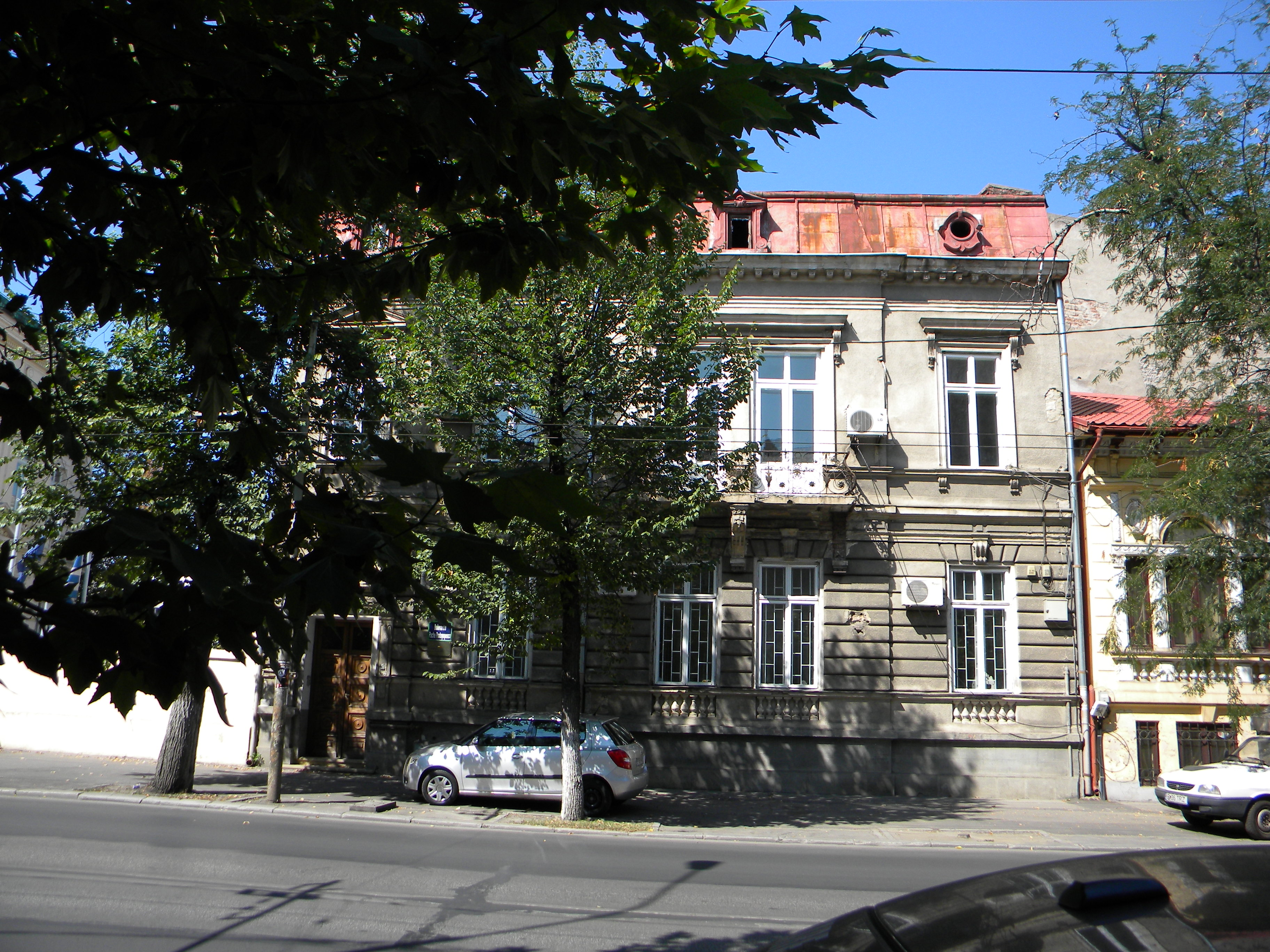 Imobil pe Str. Pache Protopopescu nr. 5, Bucuresti sect. 2